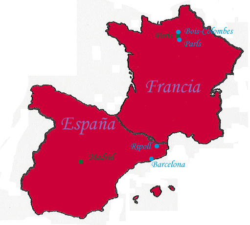 Mapa que muestra las fábricas que poseía Hispano-Suiza